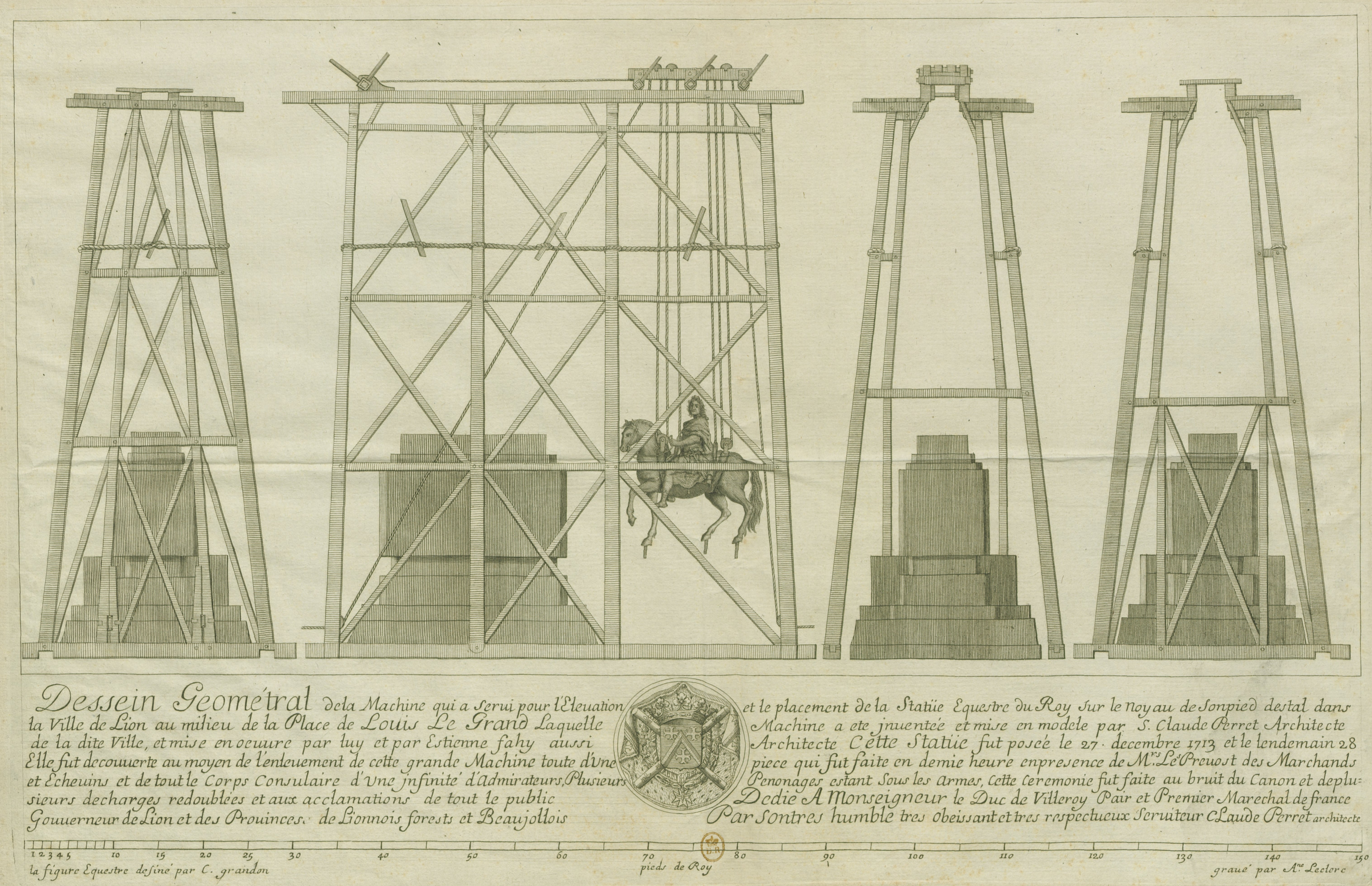 Dessein géométral de la machine qui a servi pour l'élévation et le placement de la statue équestre du Roy sur le noyau de sonpied destal [sic] dans la ville de Lion au milieu de la Place Louis le Grand.